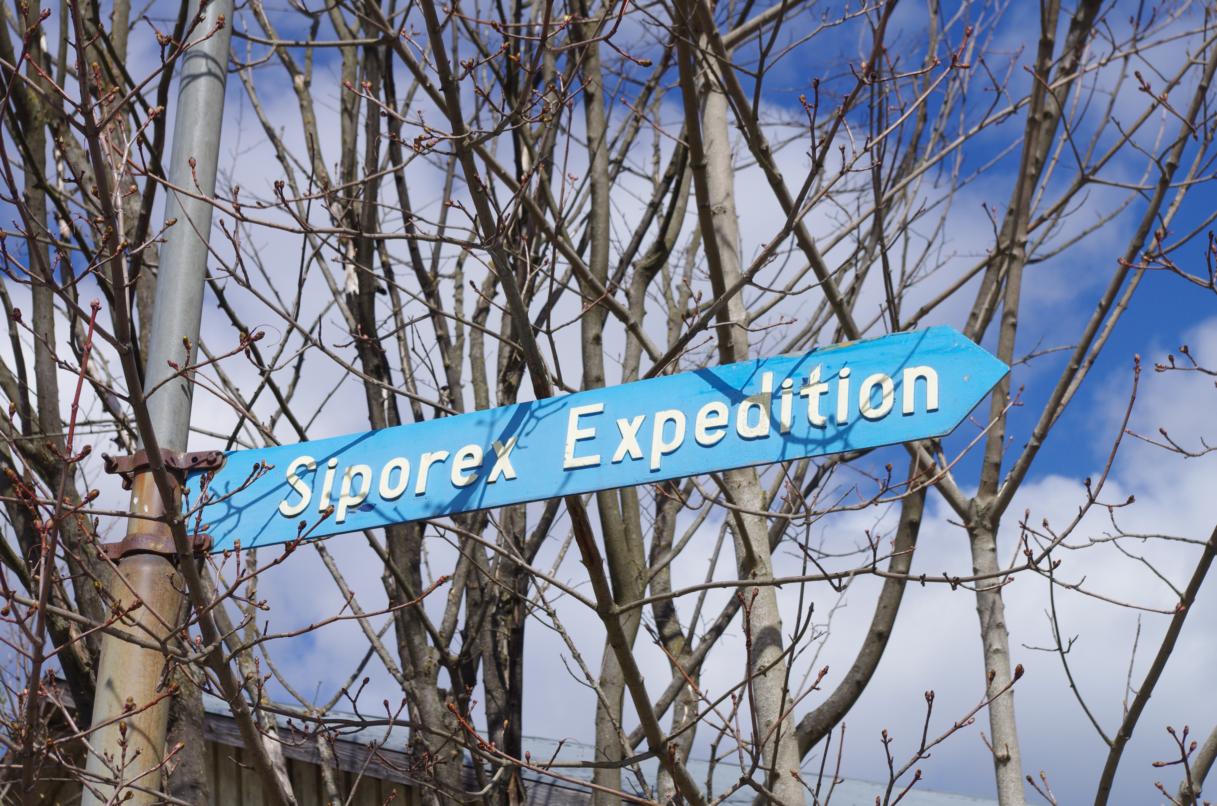 skylt vid Siporex gamla lättbetongsfabrik i Södertälje Hamn